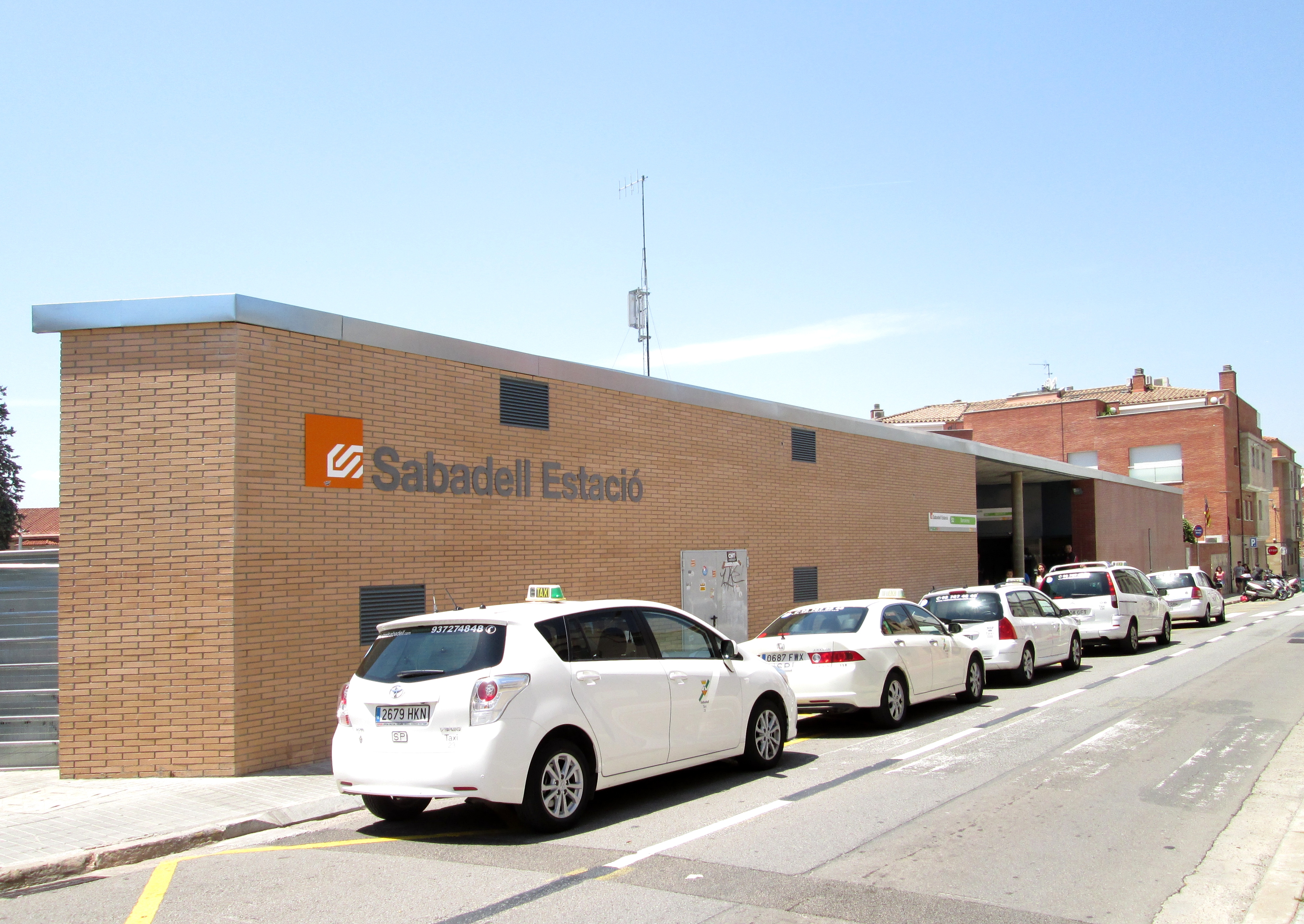 Estación nueva Sabadell Estació de los Ferrocarriles de la Generalitat de Catalunya, situada el calle Sant Jordi.